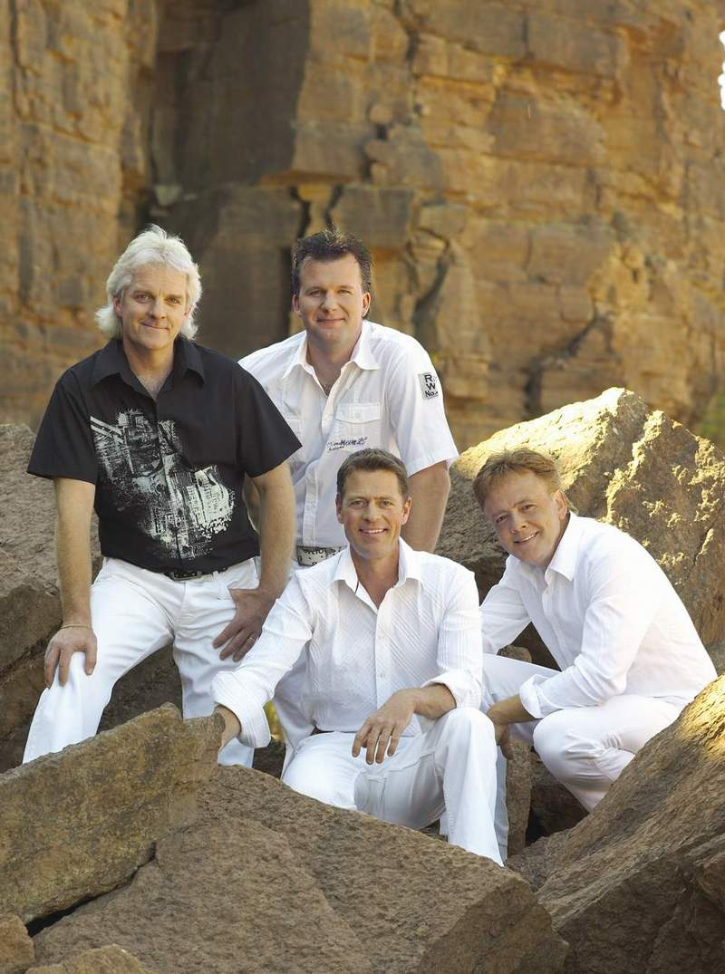 Peter Alvenfors orkester 2007 Eget foto